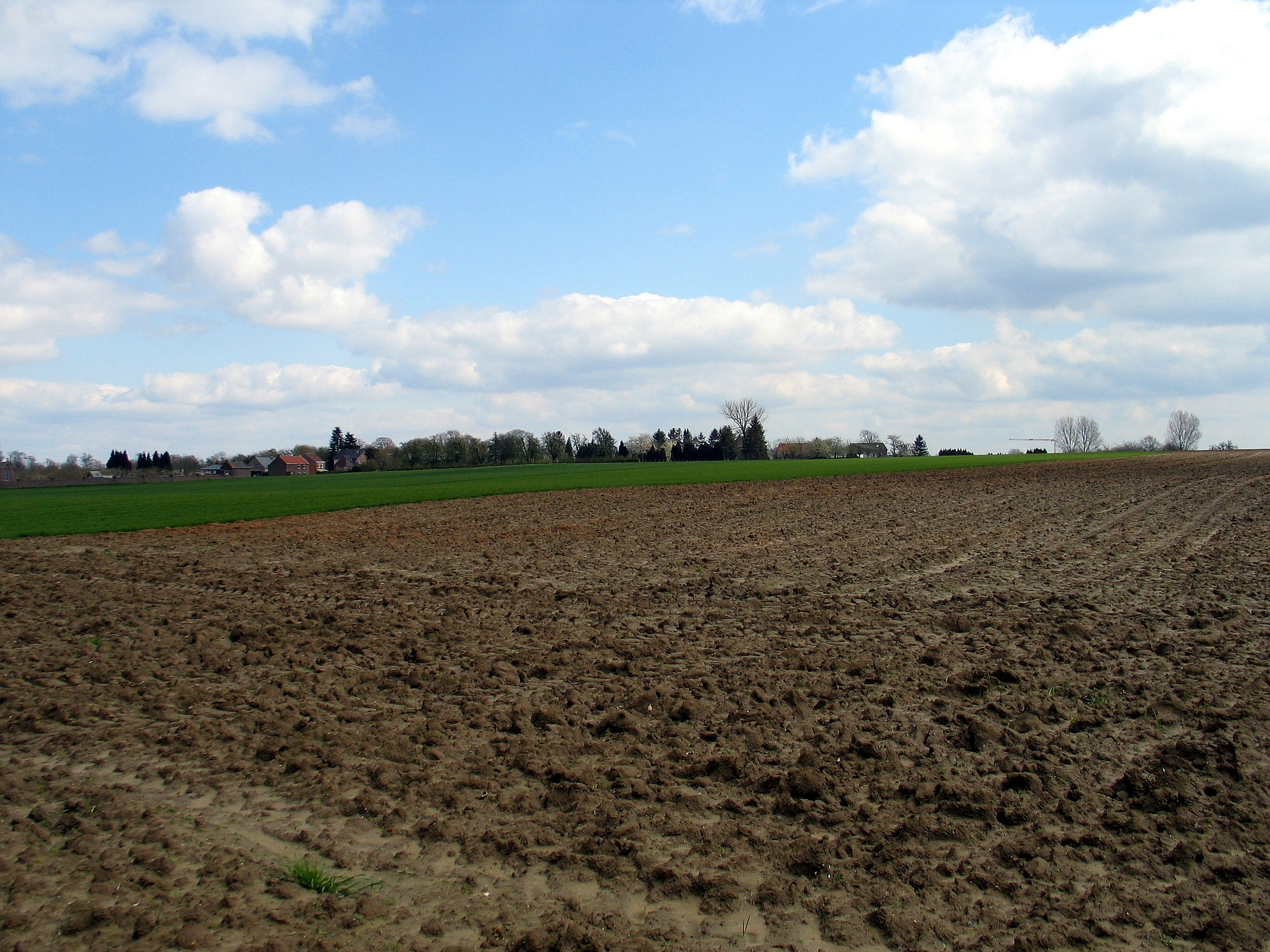 Stepsheuvel te Montenaken, België, waar de slag bij Steps plaatsvond